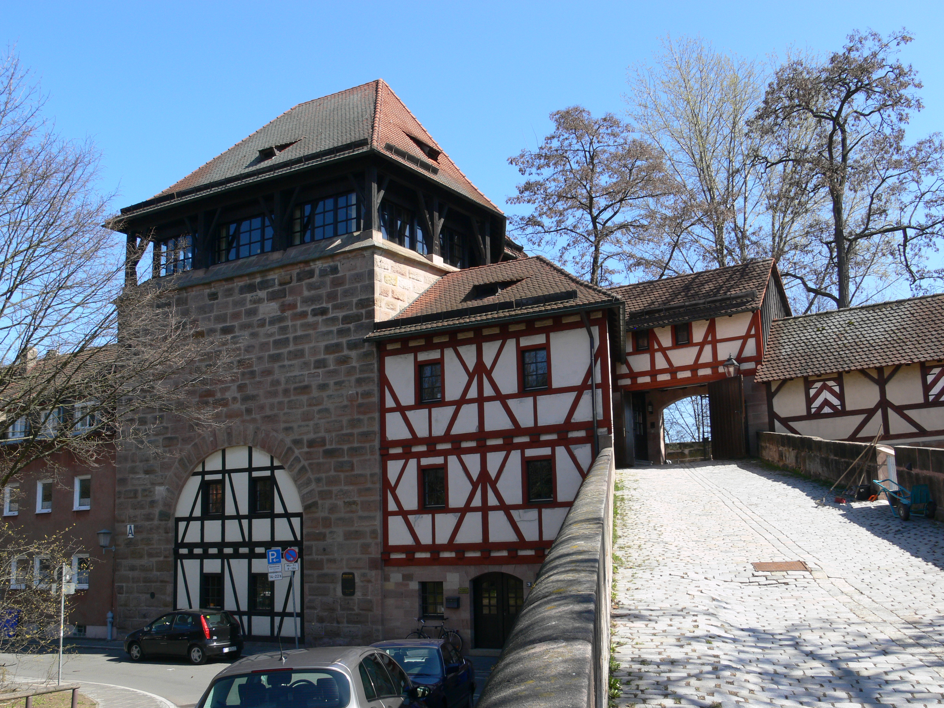 Nürnberg, Hintere Insel Schütt, Turm Blaues A (Hintere Insel Schütt Nr. 20), einer der beiden „Wehrtürme am Tratzenzwinger“, Stadtseite, rechts Kanonenauffahrt